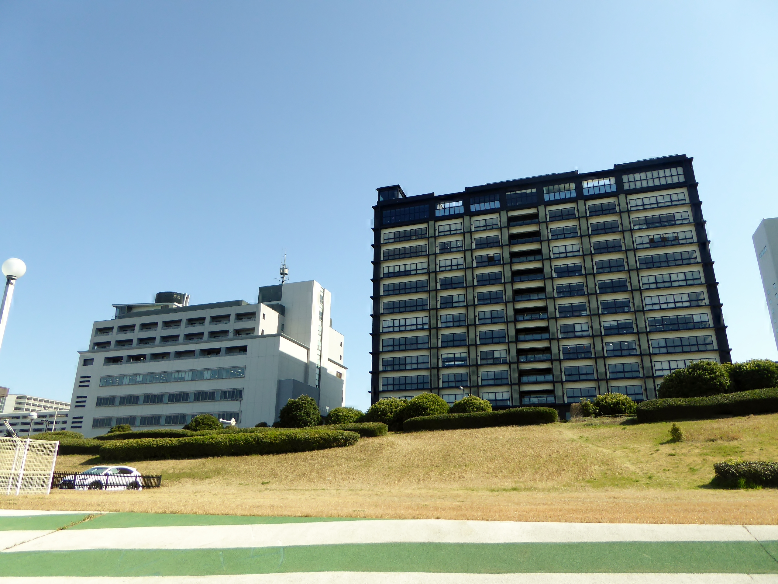 東京湾岸警察署とthe SOHOを撮影。